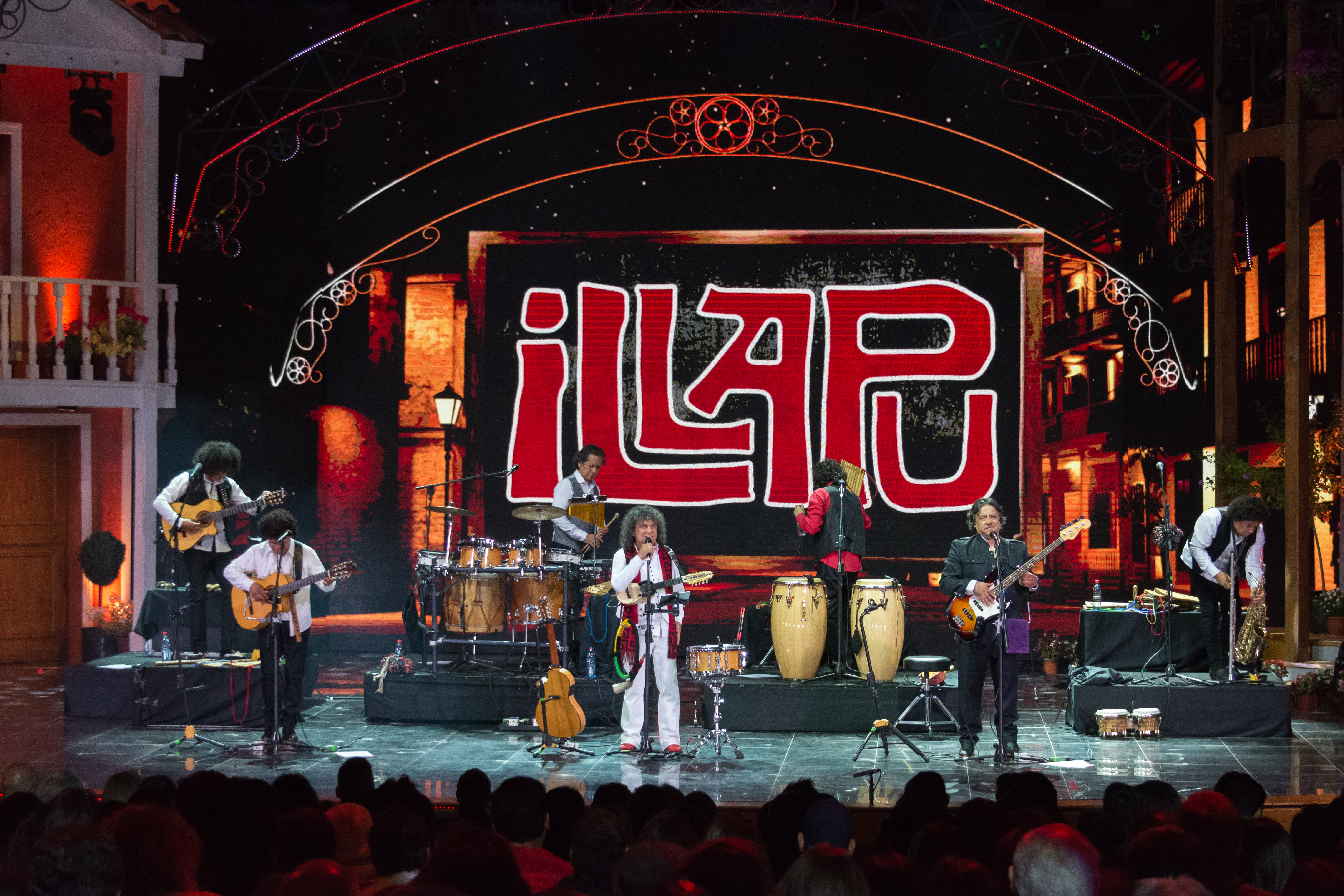 Illapu, Festival del Huaso de Olmué 2019, Olmué, Región de Valparaíso, Chile.